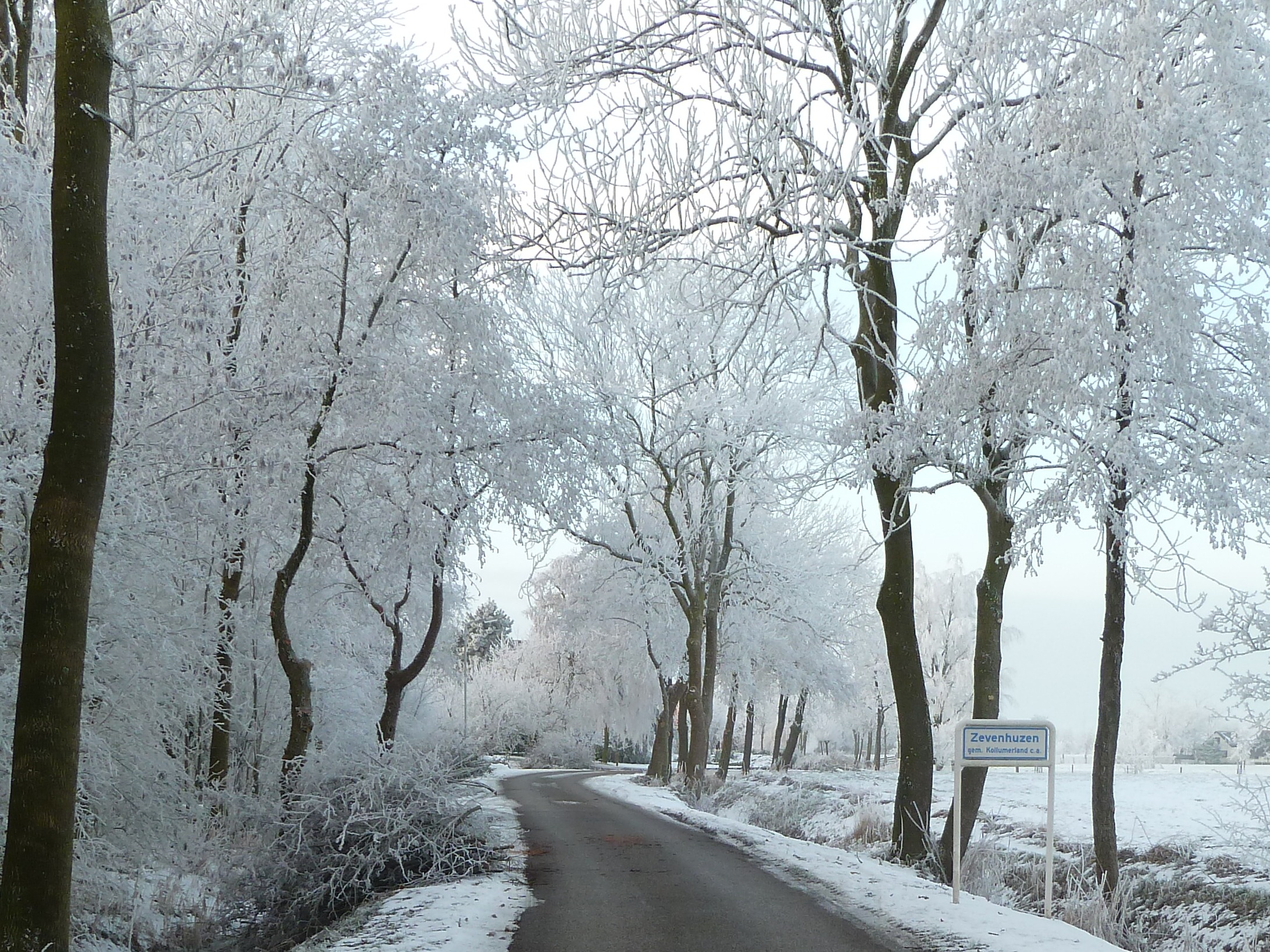 Naambordje van Zevenhuizen (officieel: Zevenhuzen) tussen met rijp bedekte bomen.